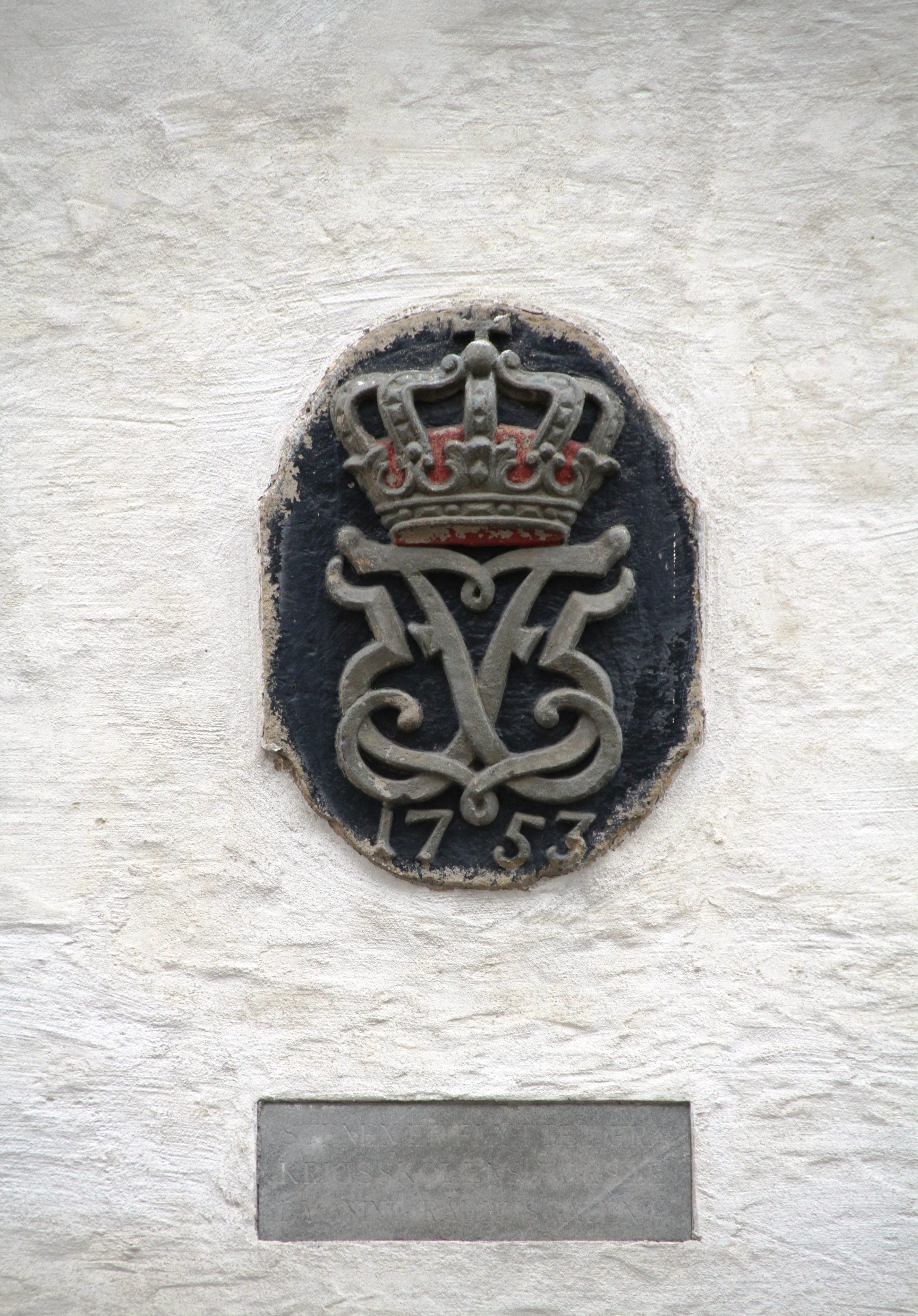 Den gamle krigsskolen i Tollbugata, Oslo.